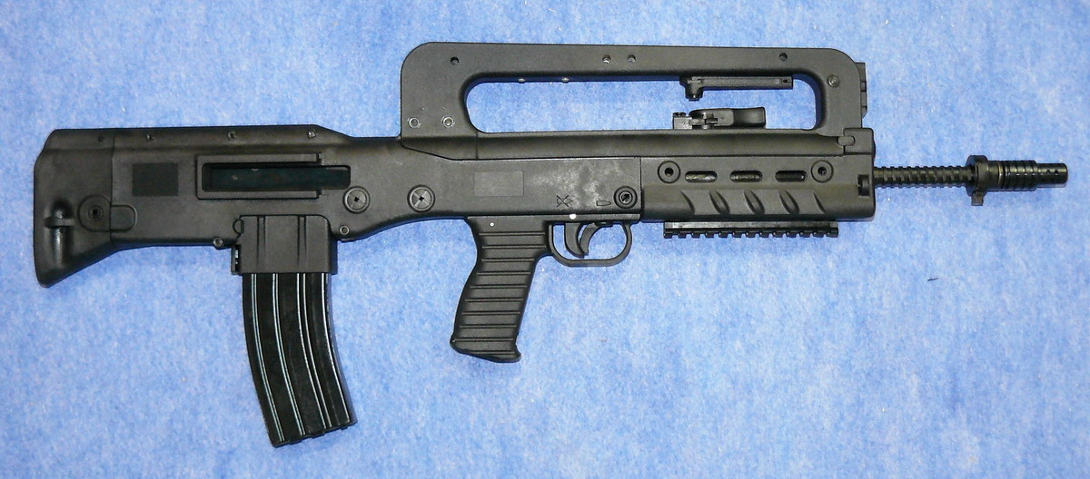 5,56 mm HS Produkt VHS-D assault rifle